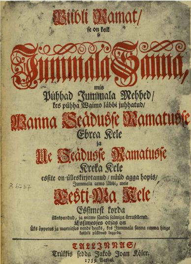 Pierwszy przekład Biblii na język estoński z roku 1739. Tłumaczem był pastor Anton thor Helle (1683–1748).